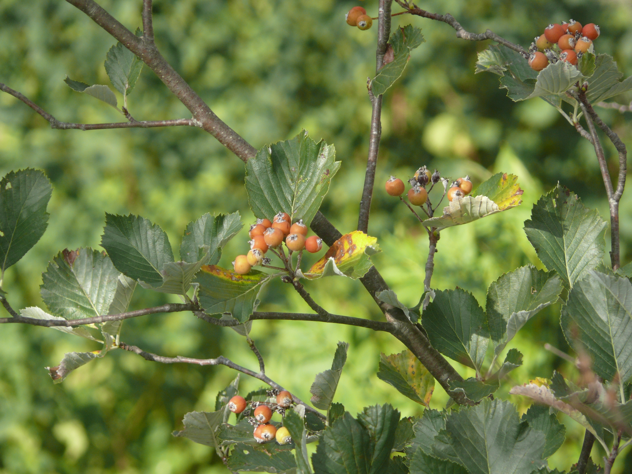 Sorbus danubialis, Altmühltal